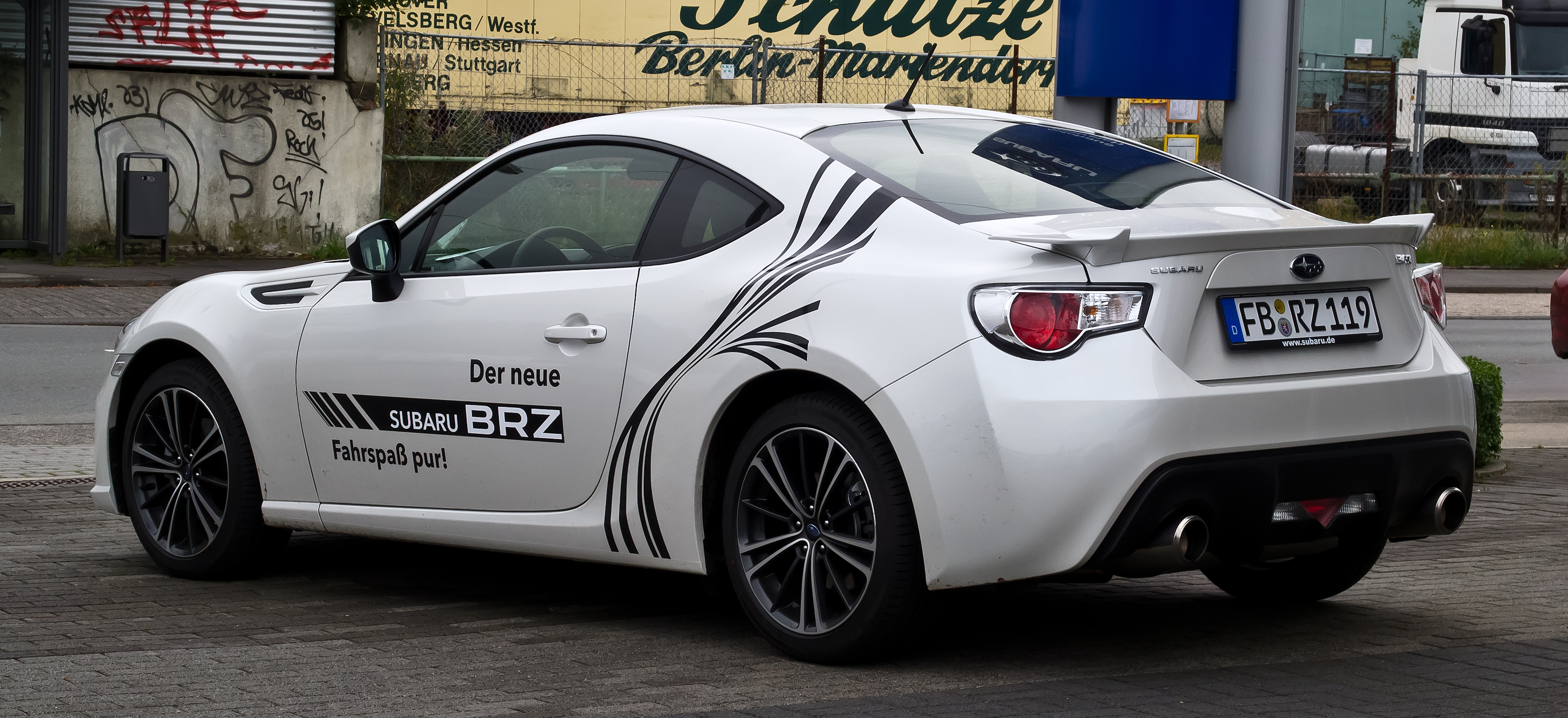 Subaru BRZ 2.0i Sport